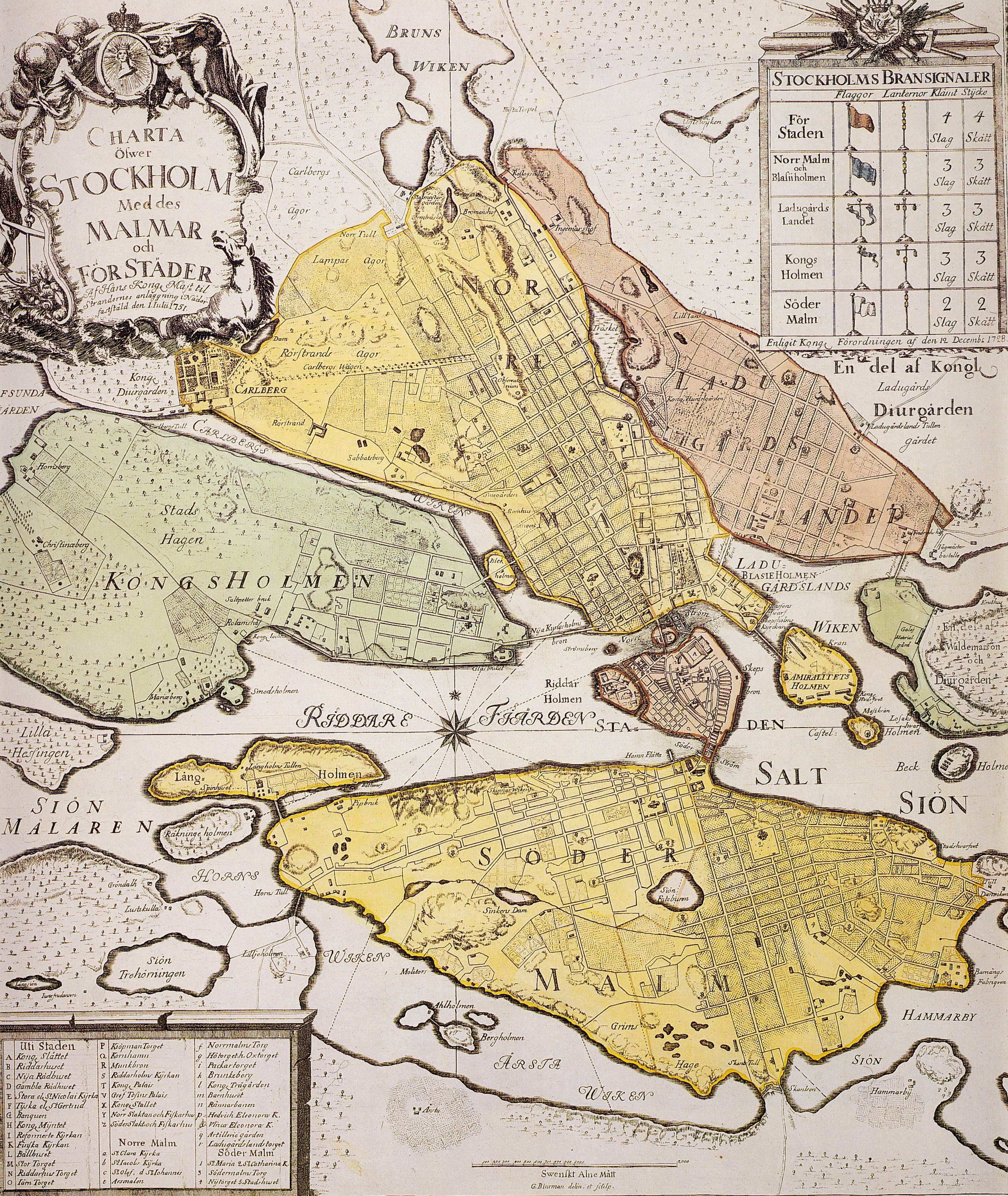 "Charta öfwer Stockholm Med des Malmar och FörStäder af Hans Kongl Majt til Strändernes anläggning i Nåder fastställd den 1 juli 1751. Graverad av Georg Biurman."